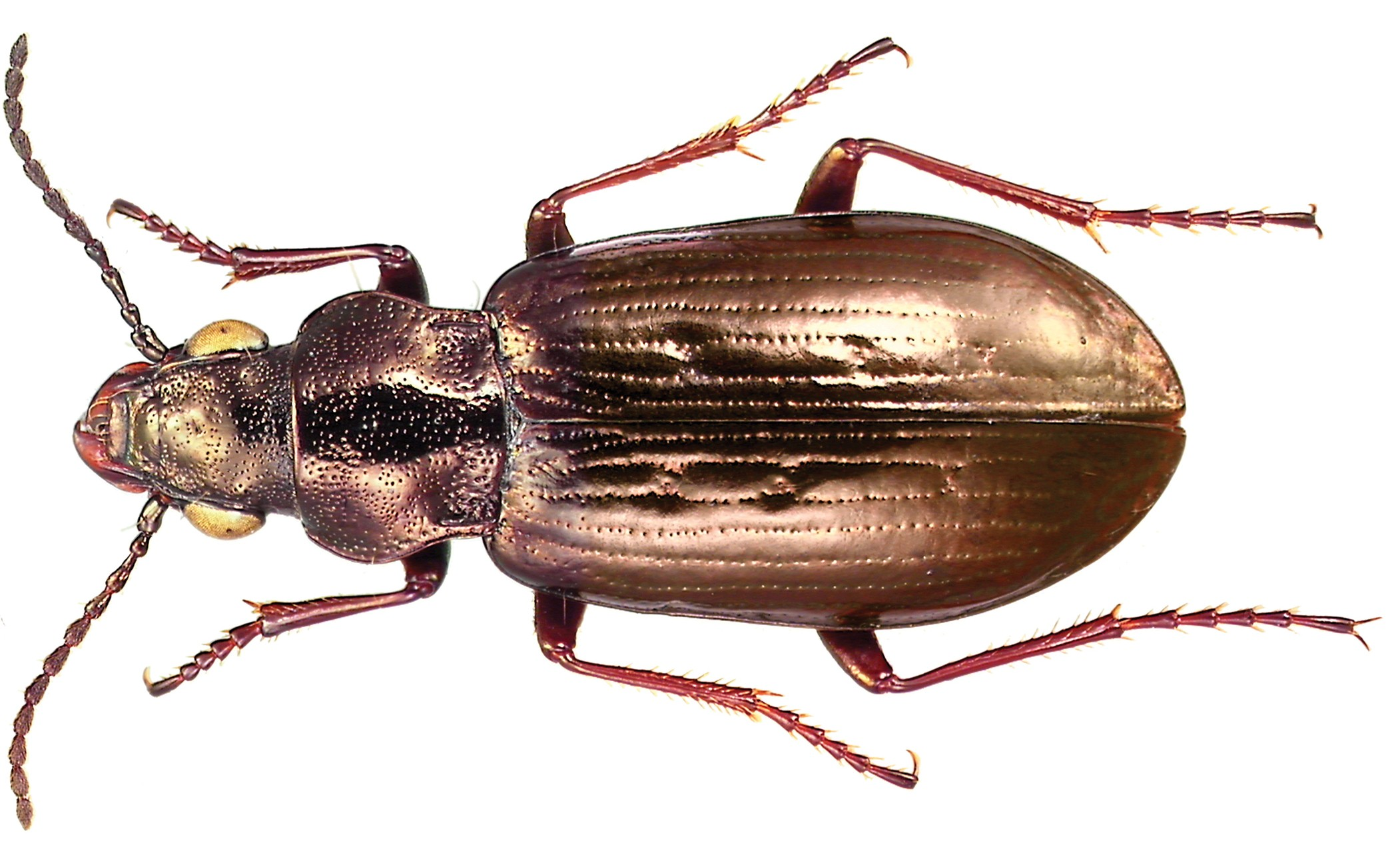 File: Diacheila_arctica_amoena_(Faldermann)_-_ZooKeys-245-001-g014 rotated